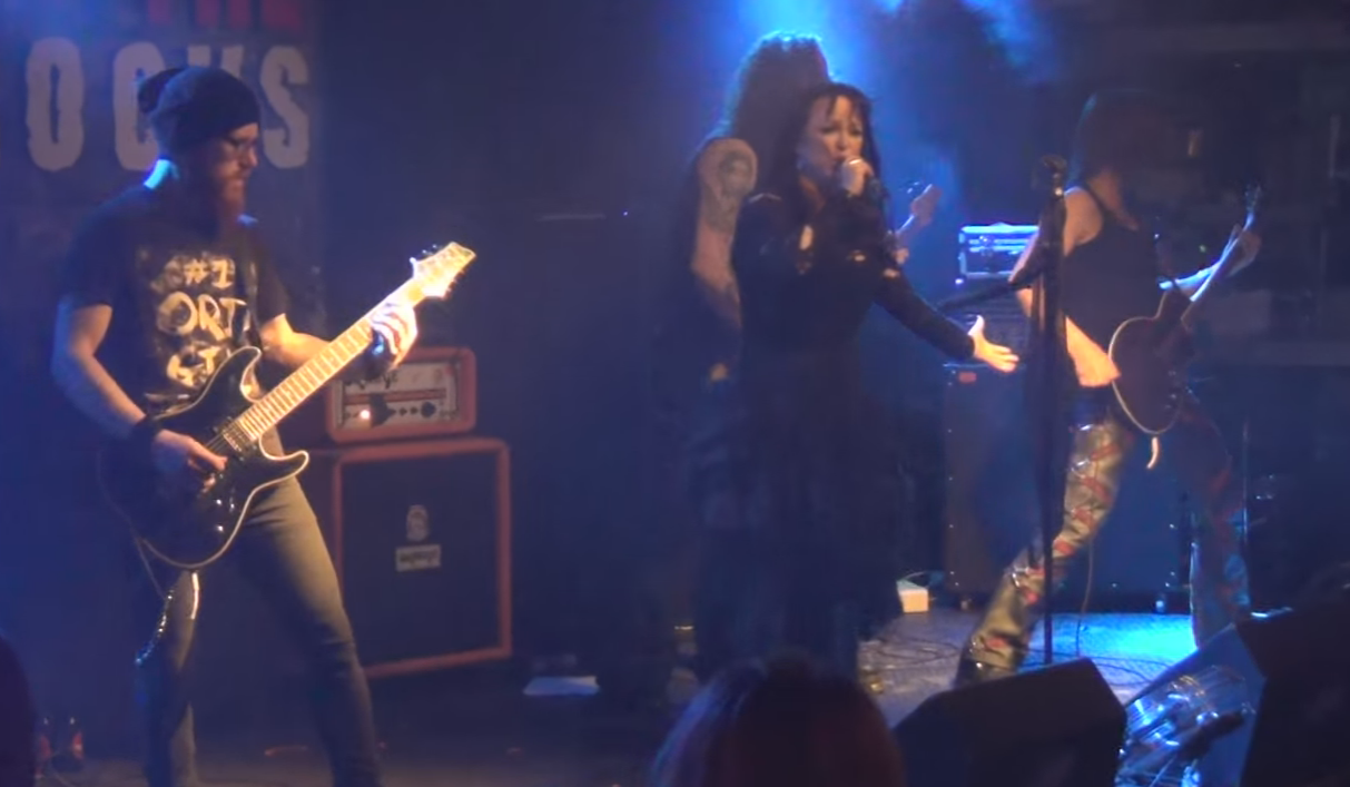 Dark Sarah en concierto